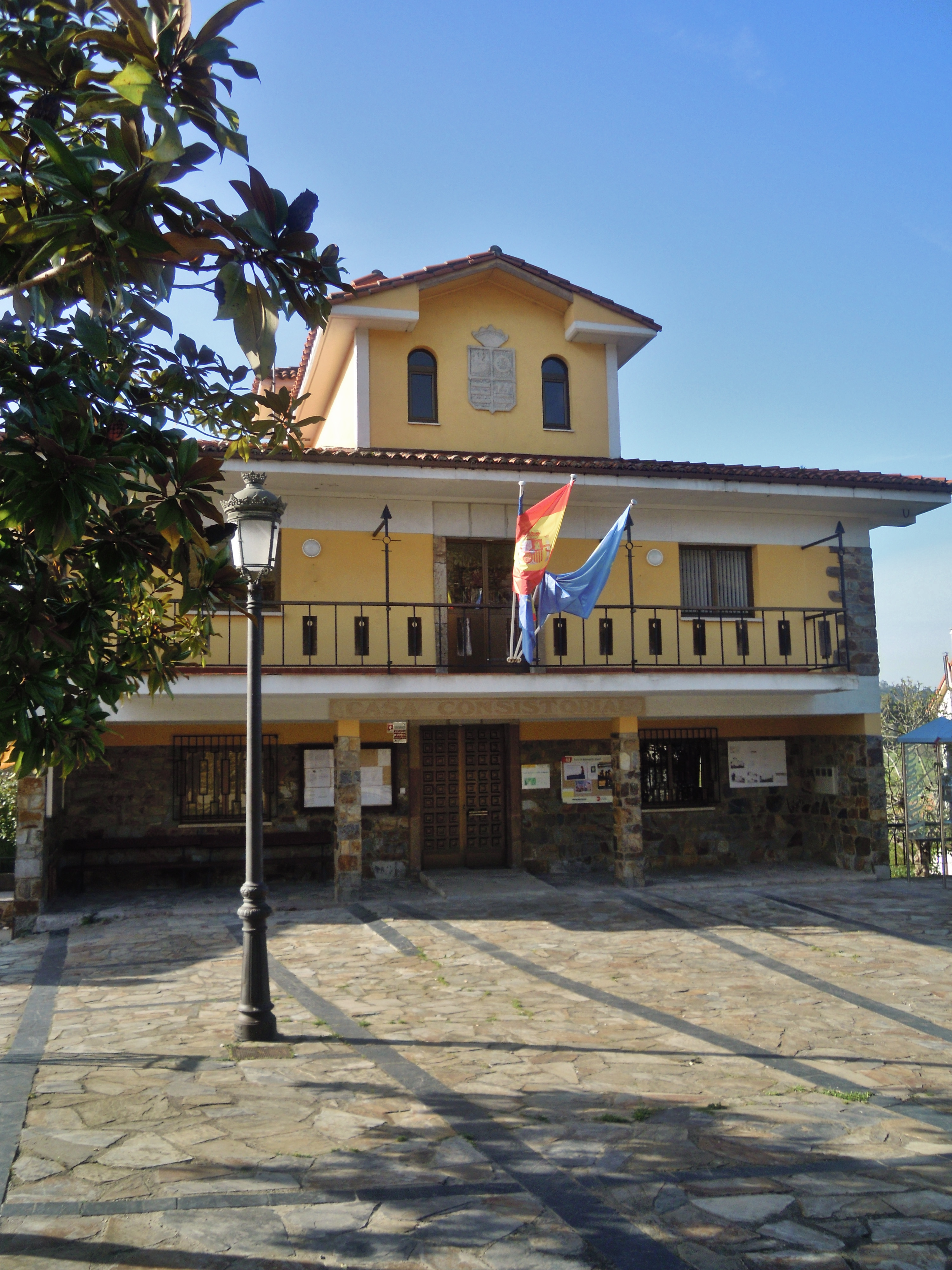 Casa del conceyu d'Illas